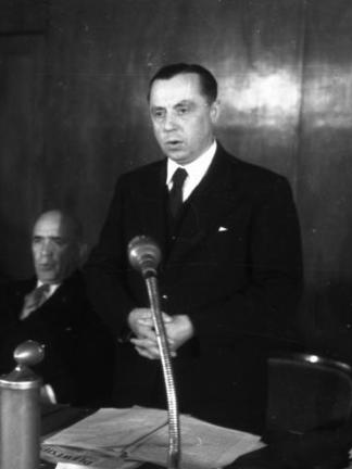 Ministerpräsidenten-Konferenz der Länder der 3 Westzonen Deutschlands auf dem Berghotel Rittersturz in Koblenz (v.l.n.r.: Dr. Hans Ehard, Louise Schroeder, Jakob Steffan, Peter Altmeier) 8.-10.7.1948